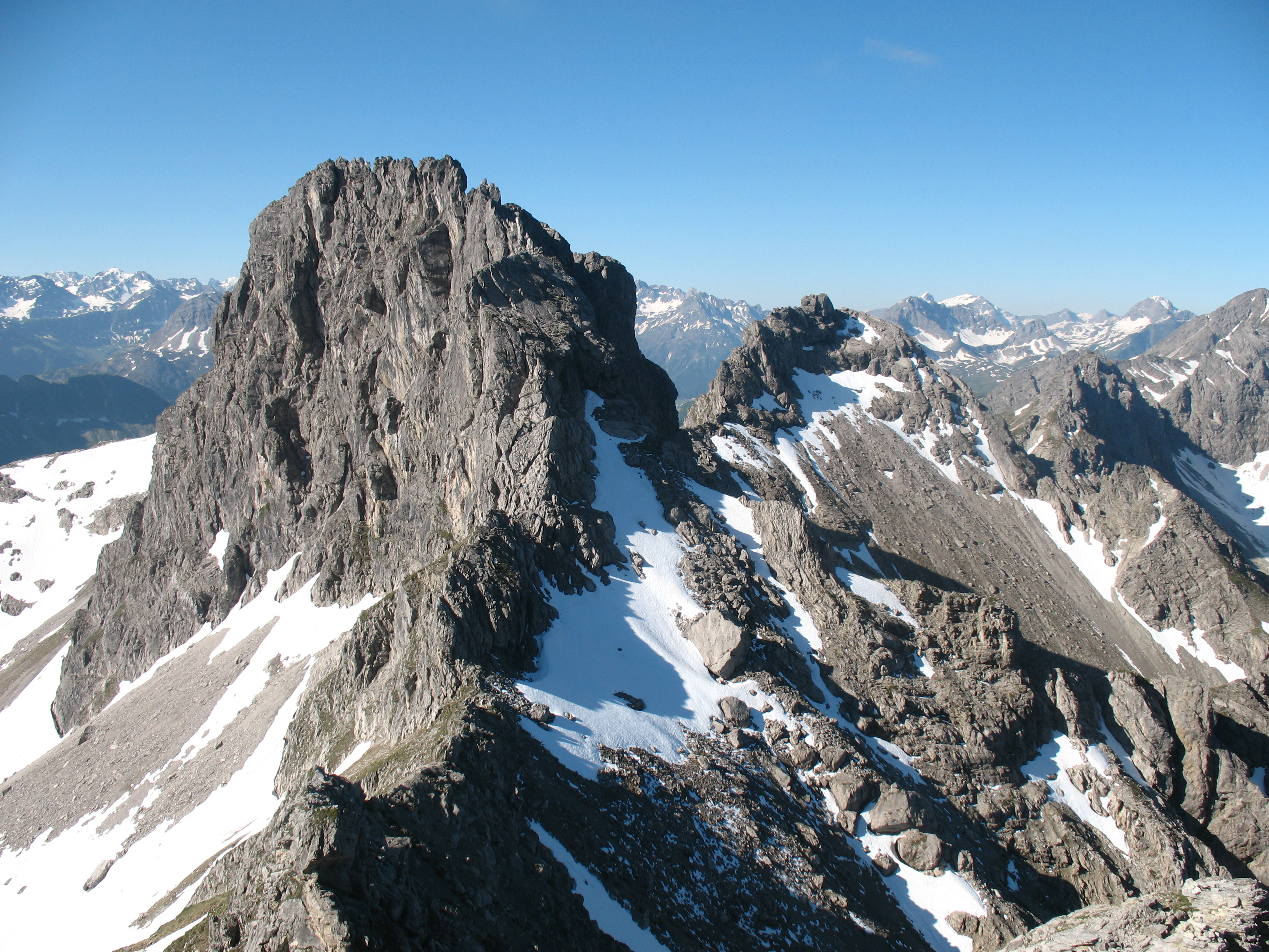 Blick vom Dritten Schafalpenkopf auf Zweiten (2302 m) und Ersten (2272 m).